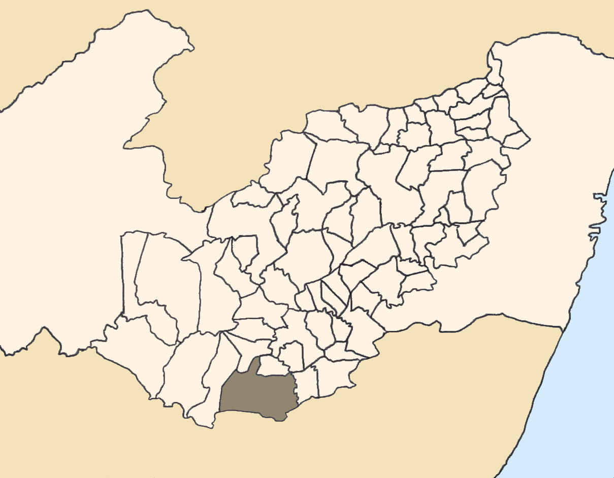 Mapa da mesorregião Agreste de Pernambuco (Brasil) subdivida em municípios. Em destaque, o município de Bom Conselho. Map of the brazilian state of Pernambuco (mesorregião Agreste) showing the city of Bom Conselho. Imagem tratada com o GIMP. Image made with GIMP.